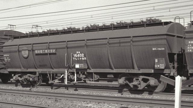 タキ6400形タキ16402。与野駅付近にて。